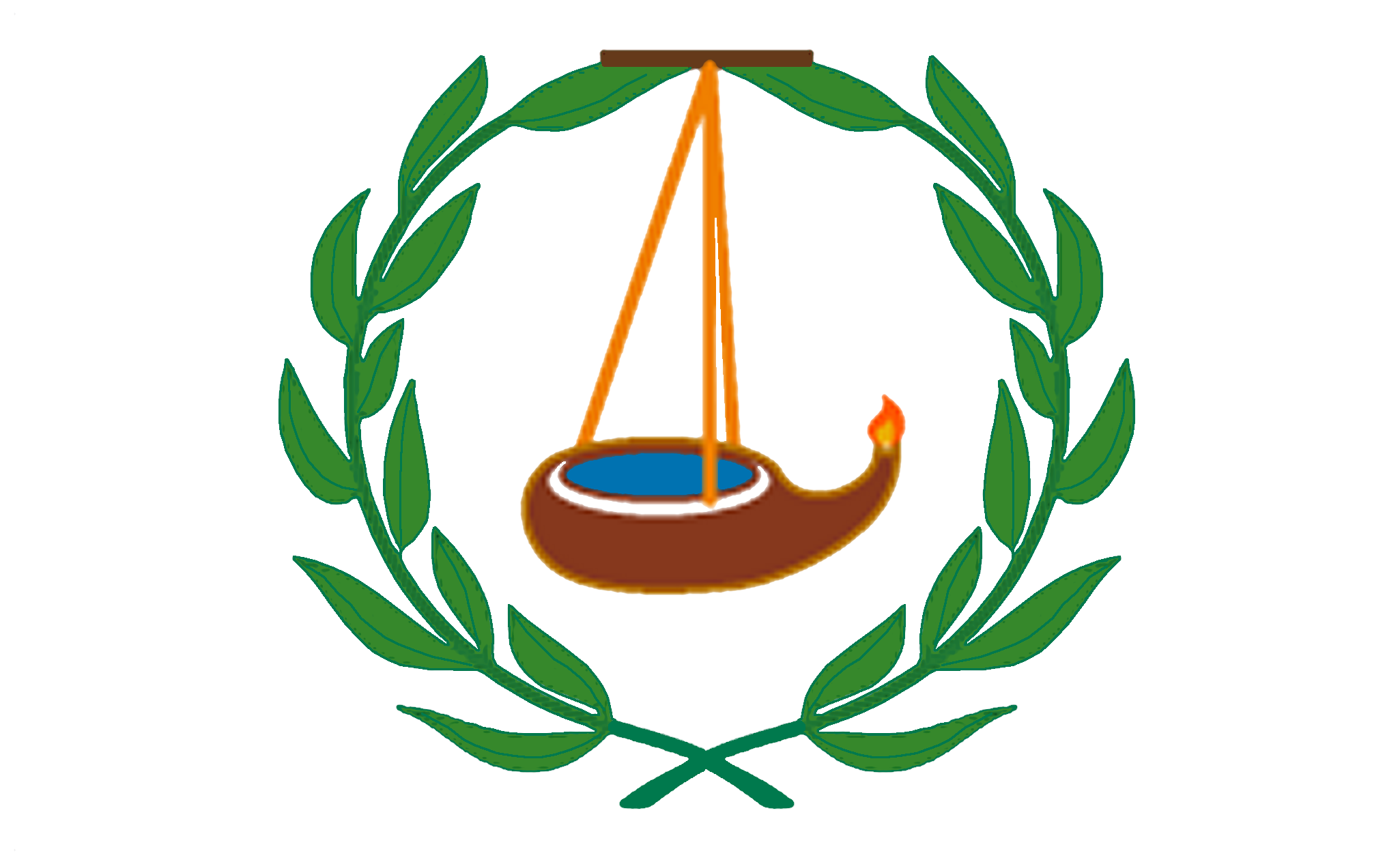 Flag of Ngatpang State Palau